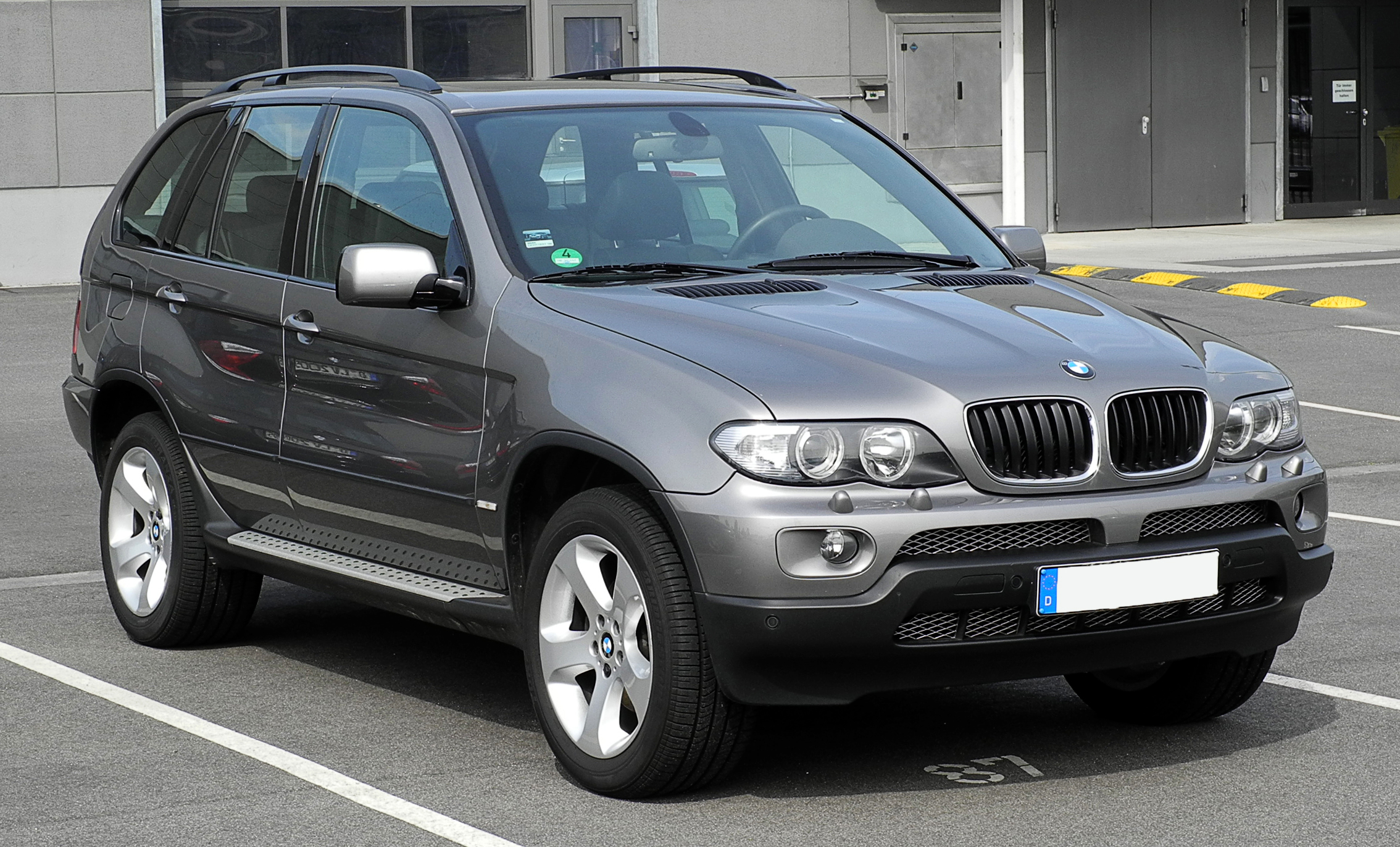 BMW X5 (E53, Facelift)